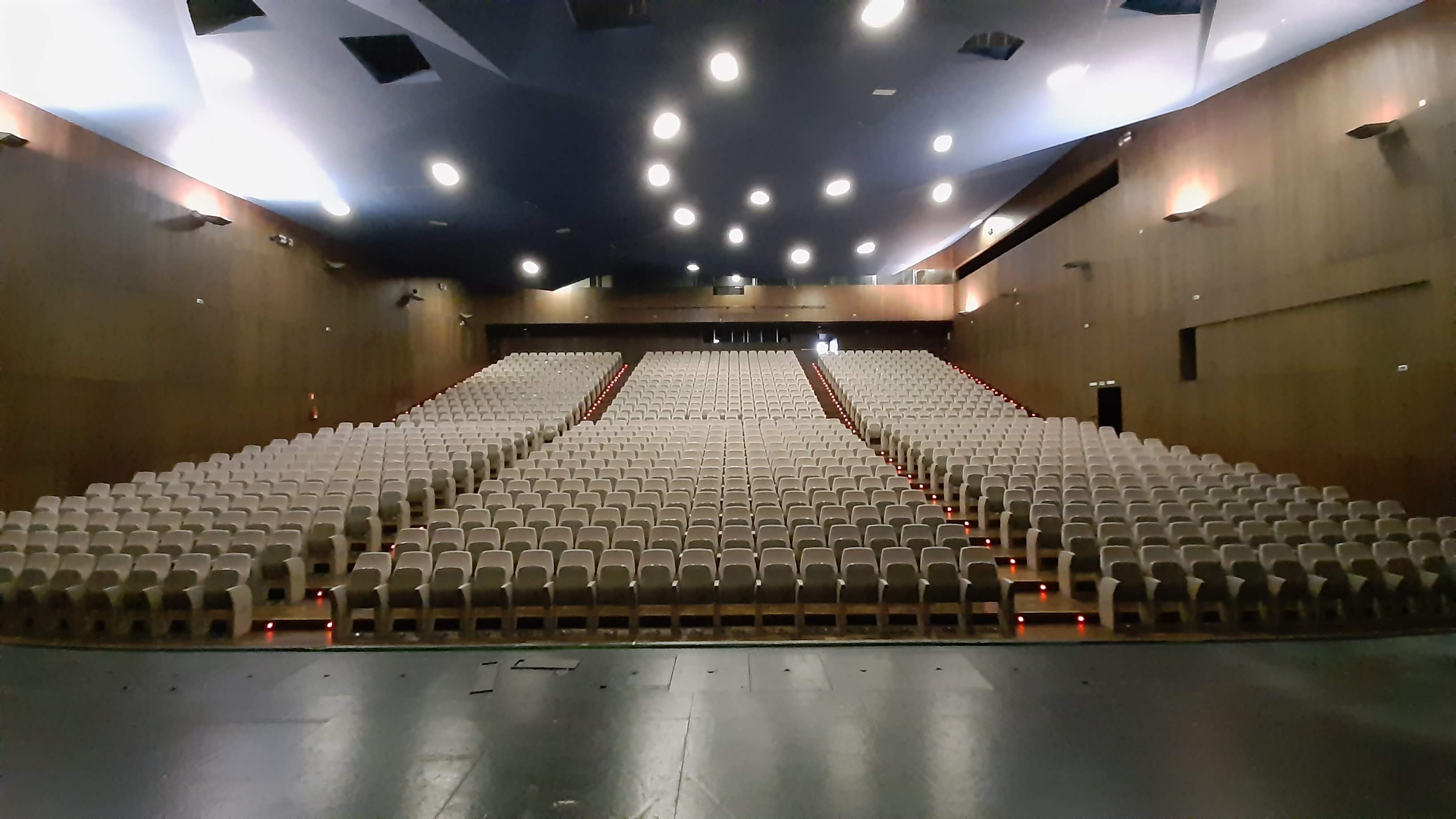 Sala Albacete, capacidad 1037 personas.